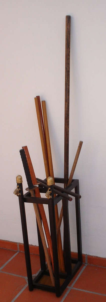 «Katanero» personal. Contenido: 1 bokken (95 cm.) con tsuba, 1 bokken (95 cm.) con tsuba y tsuka-ito, , 3 jo (130 cm.), 1 bo (180 cm.), 1 hanbo (90 cm.) y 2 tanbo (50 cm.)